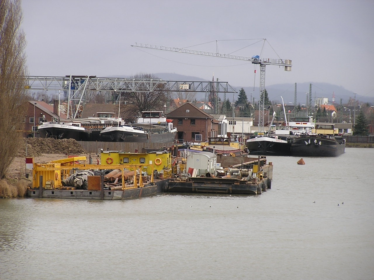 Industriehafen II am Wasserstraßenkreuz Minden bei Minden, Nordrhein-Westfalen. Der Industriehafen gehört zum Südabstieg, der den Mittellandkanal mit der Weser verbindet. Über die Untere Schleuse ist der Hafen mit der Weser verbunden, über die Obere Schleuse mit dem Mittellandkanal. Im Hintergrund ist das Wesergebirge zu erkennen.